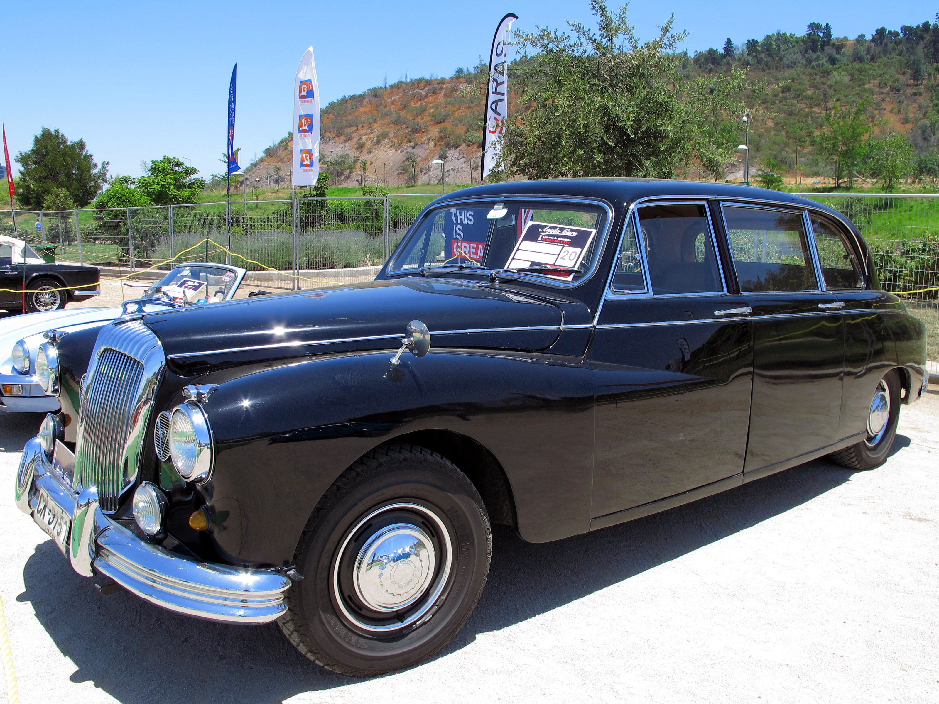 Daimler DR 450 Limousine 1968